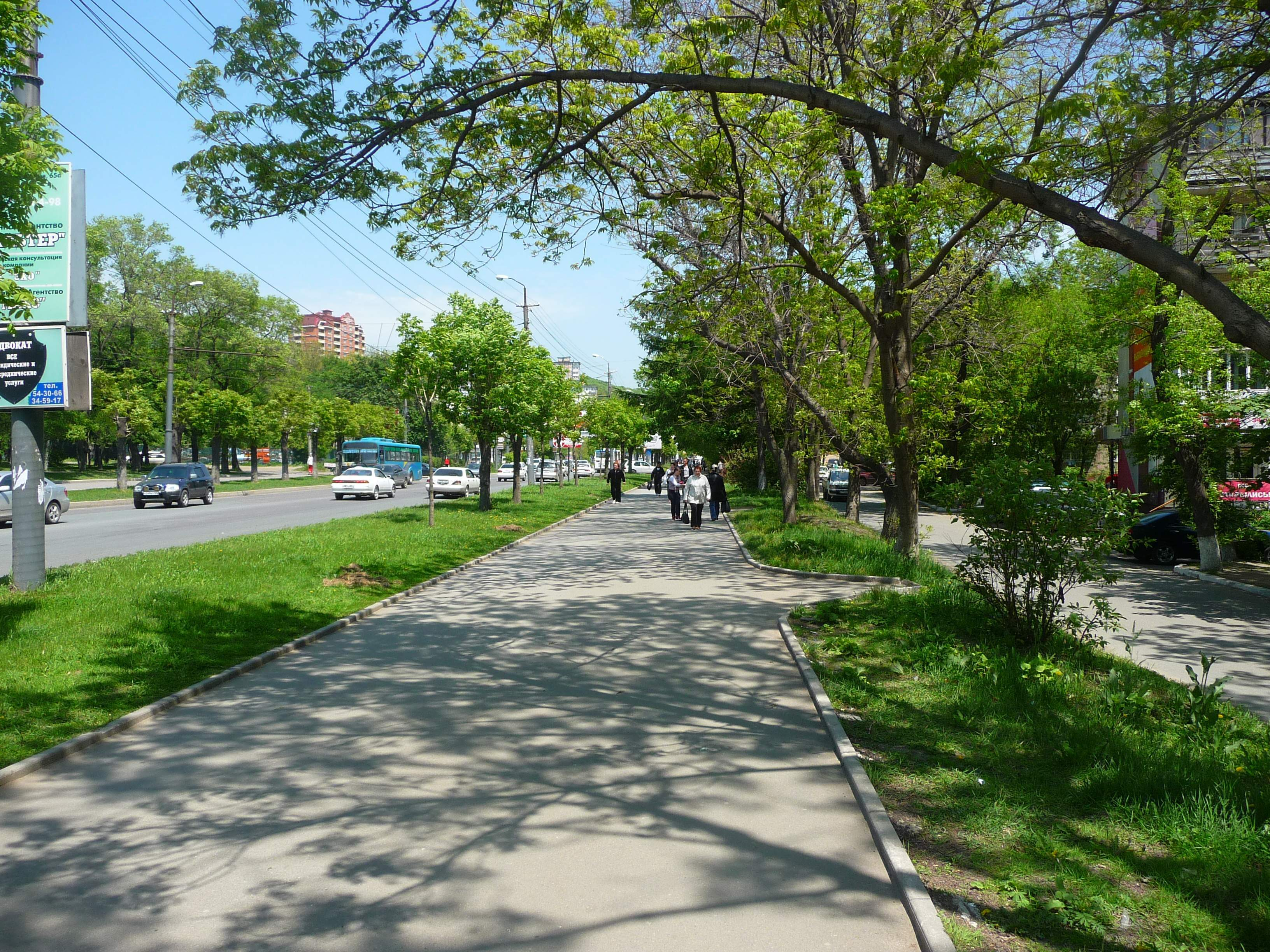 Владивосток, ул. Русская